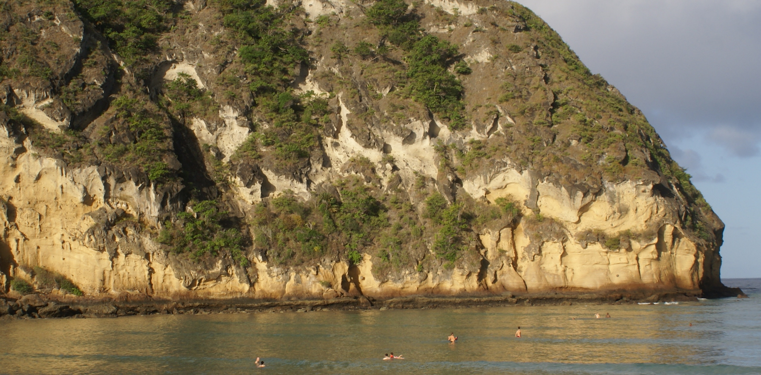 Falaises de palagonite de la plage de Moya à Mayotte (Petite-Terre)